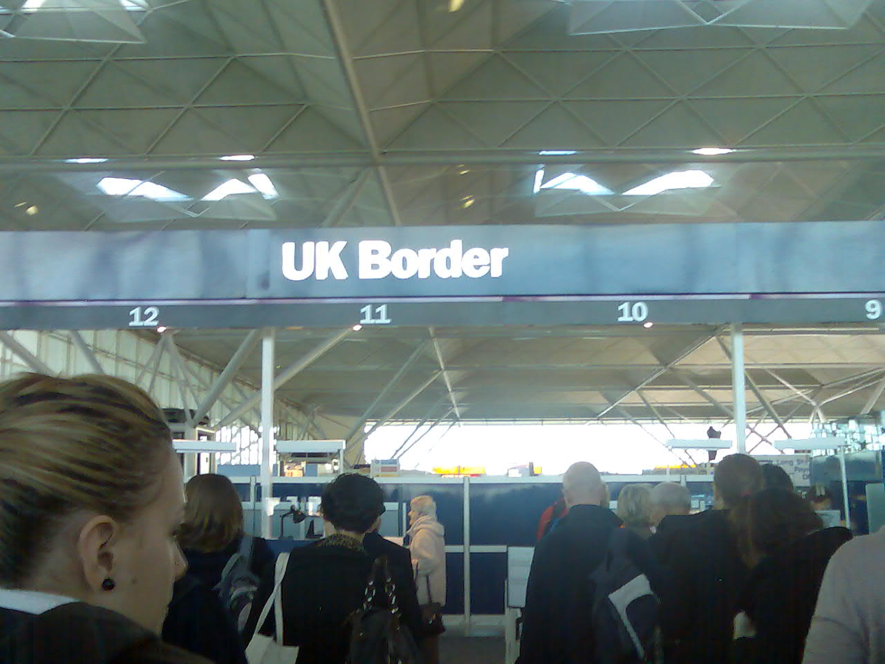 Aduana en el aeropuerto de Stansted.